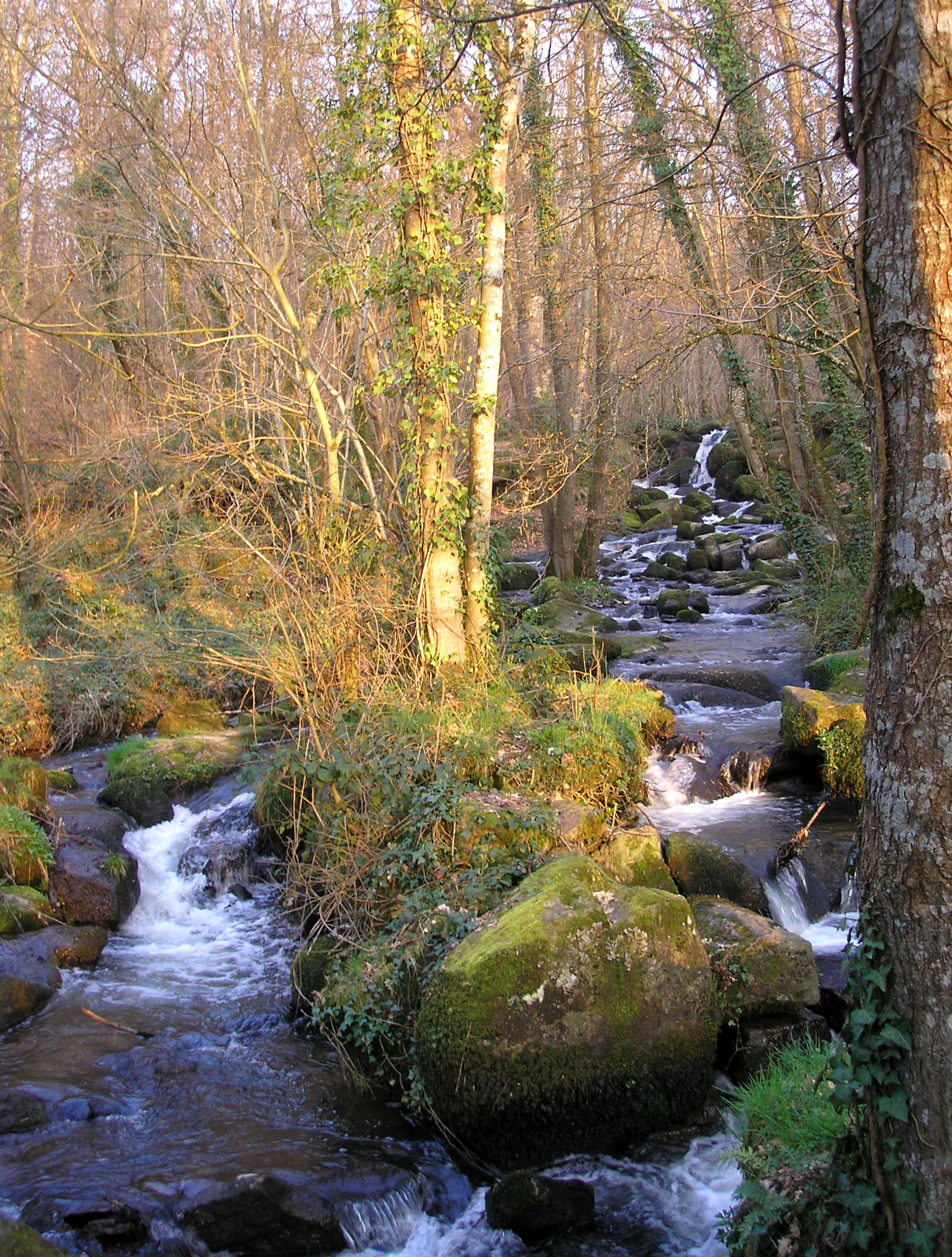 Cascades de la Vire entre Roullours, à gauche, et Maisoncelles-la-Jourdan, à droite, (Normandi, France).